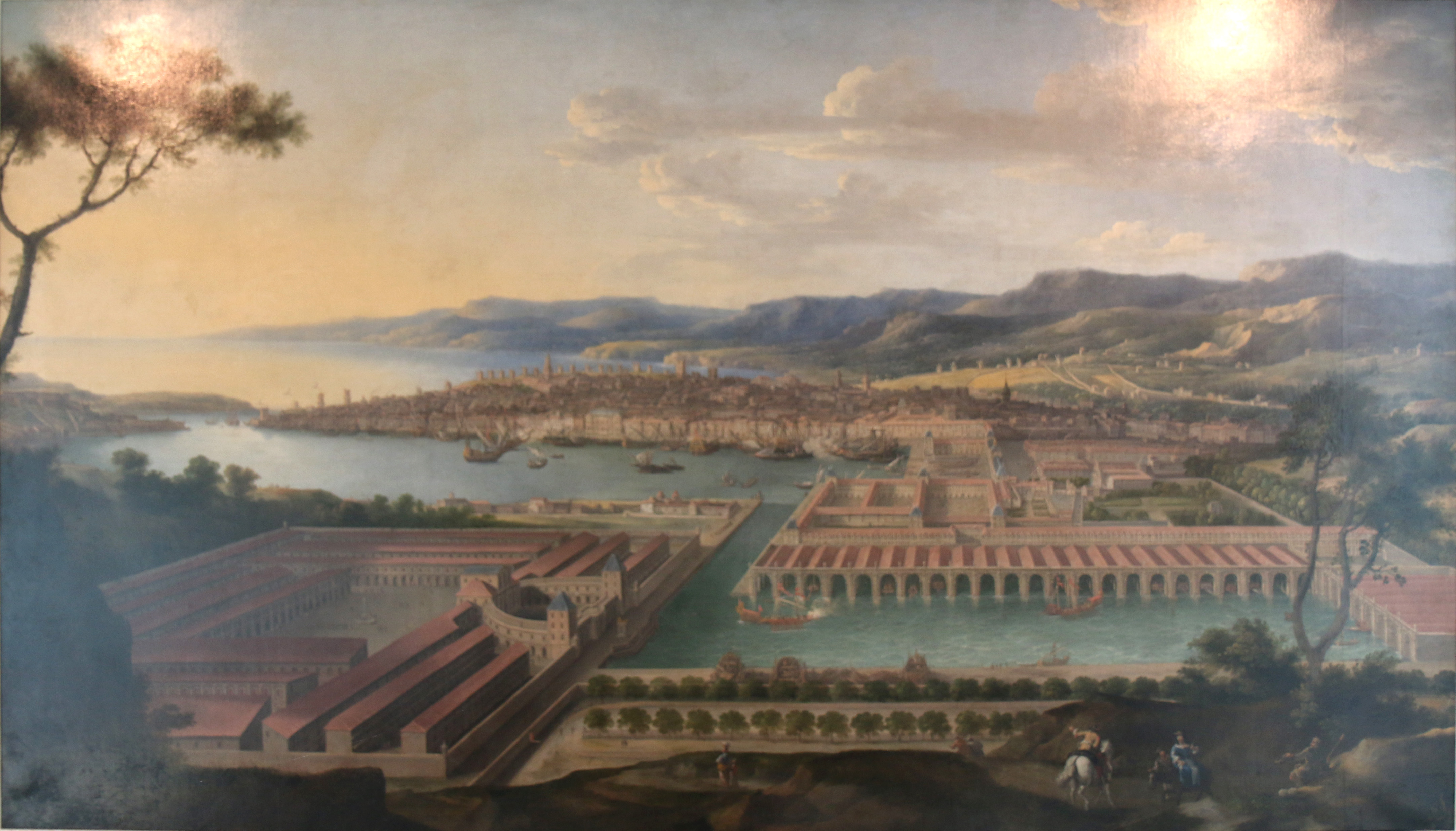 Tableau (huile sur toile) de 1668 attribué à Jean-Baptiste de La Rose représentant un projet d'arsenal des galères à Marseille, projet qui ne sera jamais réalisé.